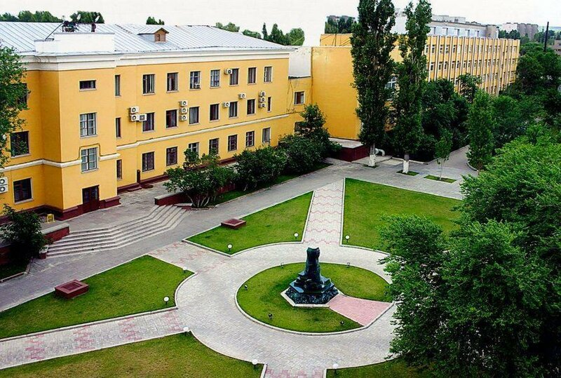 Так выглядит внутренний двор заводоуправления Саратовстройстекло